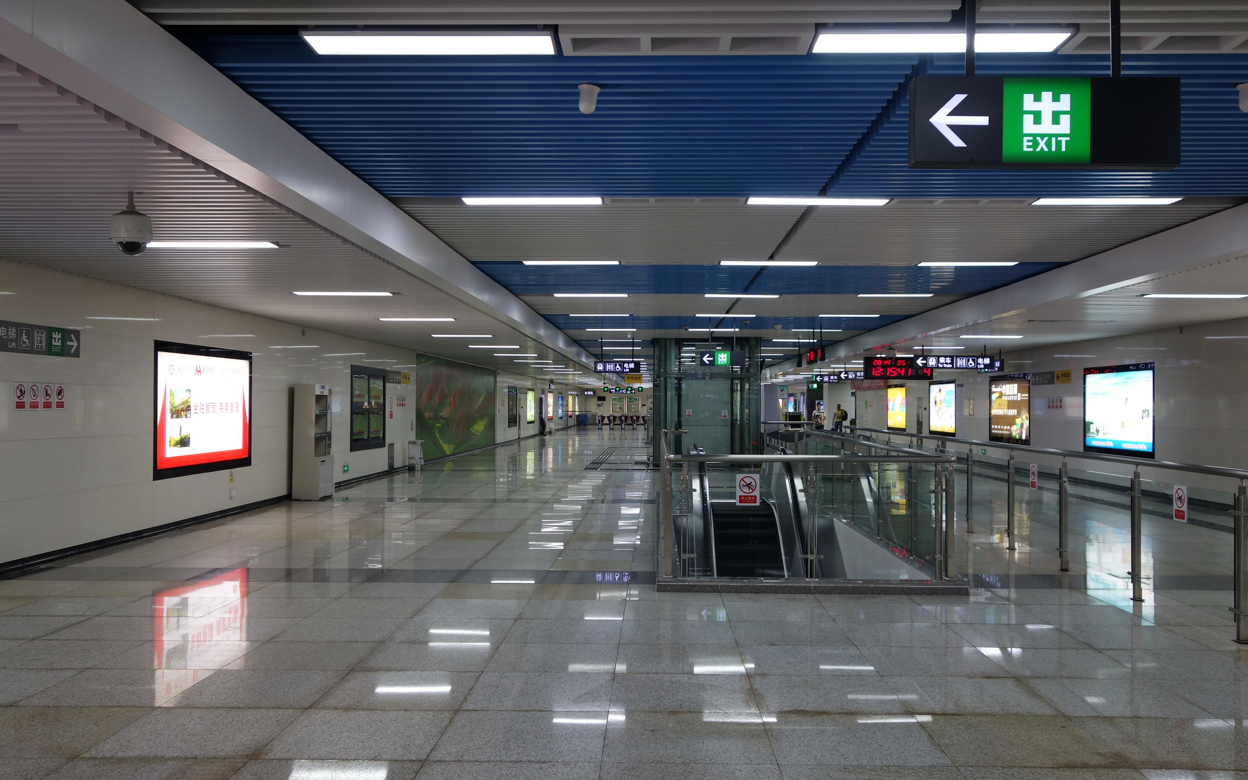 燕南站无柱站厅层